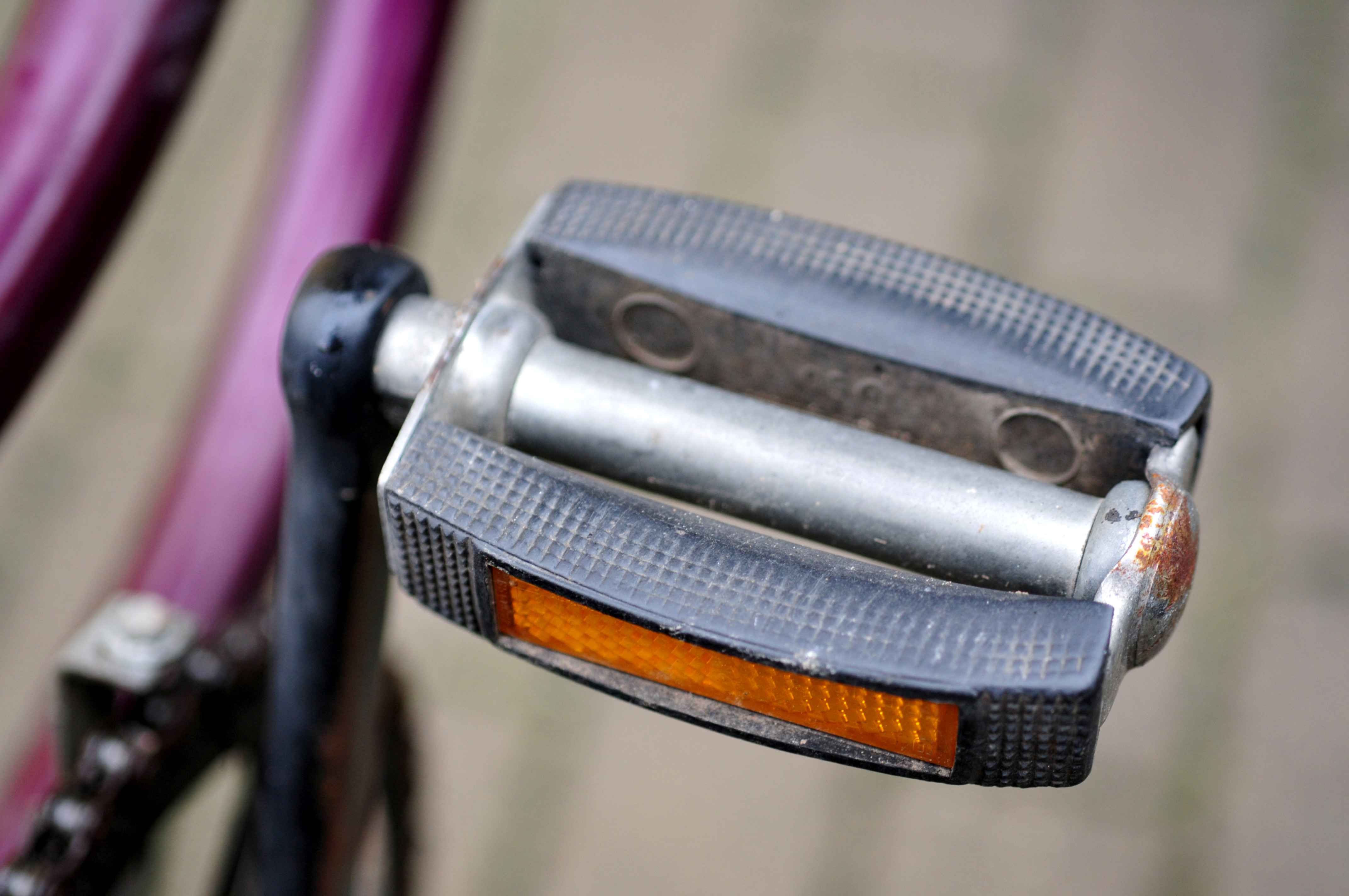 Fahrradkram